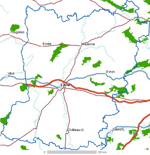 Carte du département Mayenne Légende